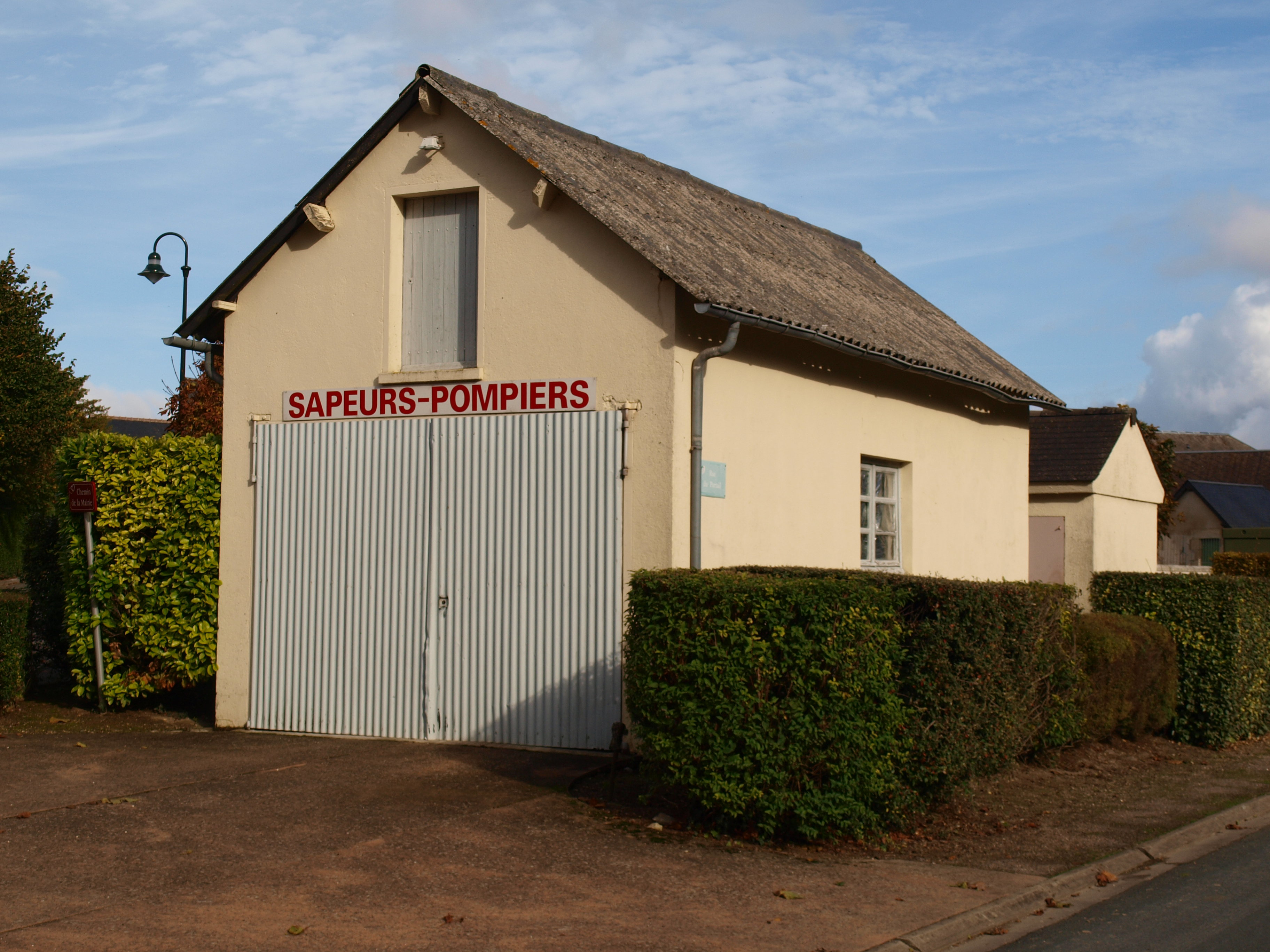 Saint-Valentin (Indre, France) ; caserne des sapeurs-pompiers.